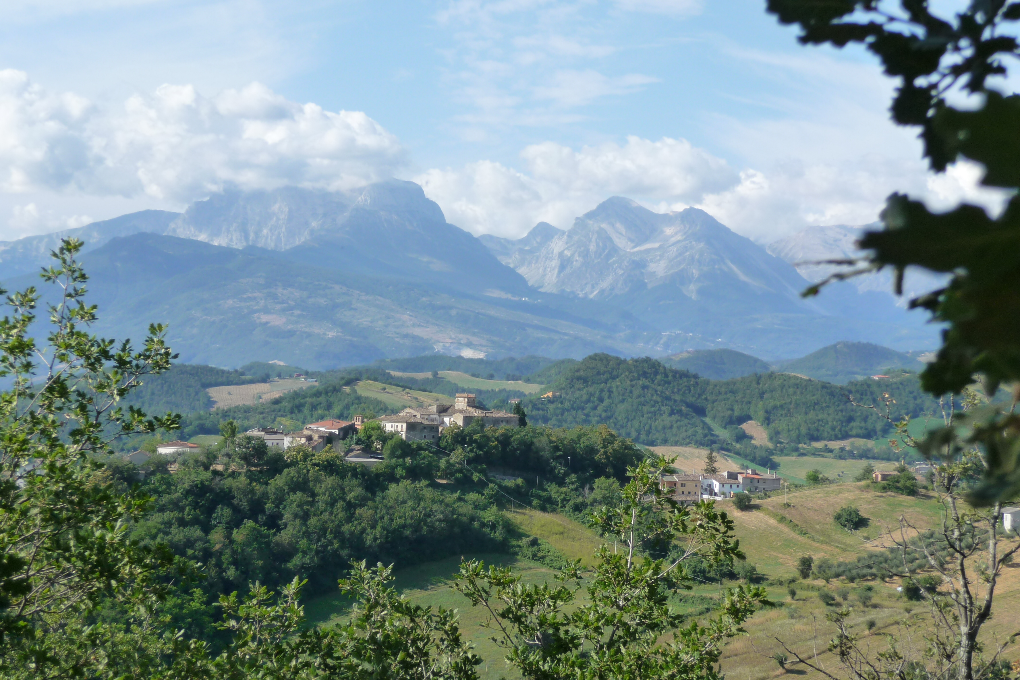 Castagneto, foto personale, 18 agosto 2008, Lucio De Marcellis, licenza GFDL